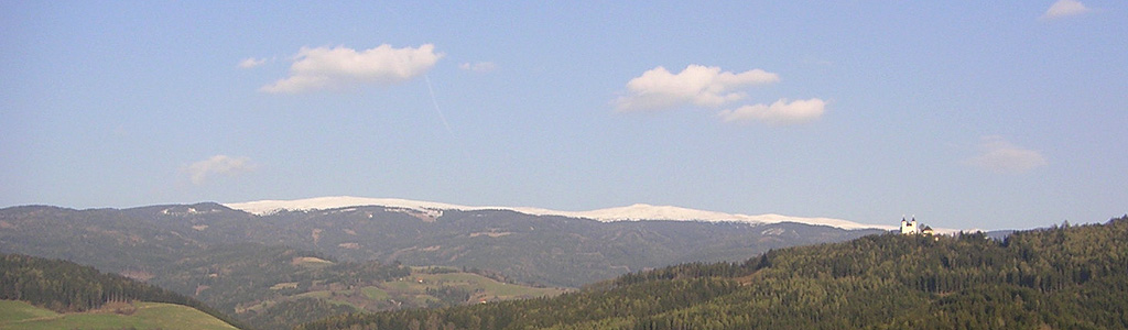 Saualpe in Kärnten, Sicht aus dem Guttaringer Becken, rechts Wallfahrtskirche Maria Hilf Fotograf (Peter Binter) gibt Bild als Public Domain frei 19:39, 25. Apr 2005 Binter 1024 x 300 (115225 Byte) (Saualpe in Kärnten, April 2005, Sicht aus dem Guttaringer Becken, rechts Wallfahrtskirche Maria Hilf, selbst fotografiert)